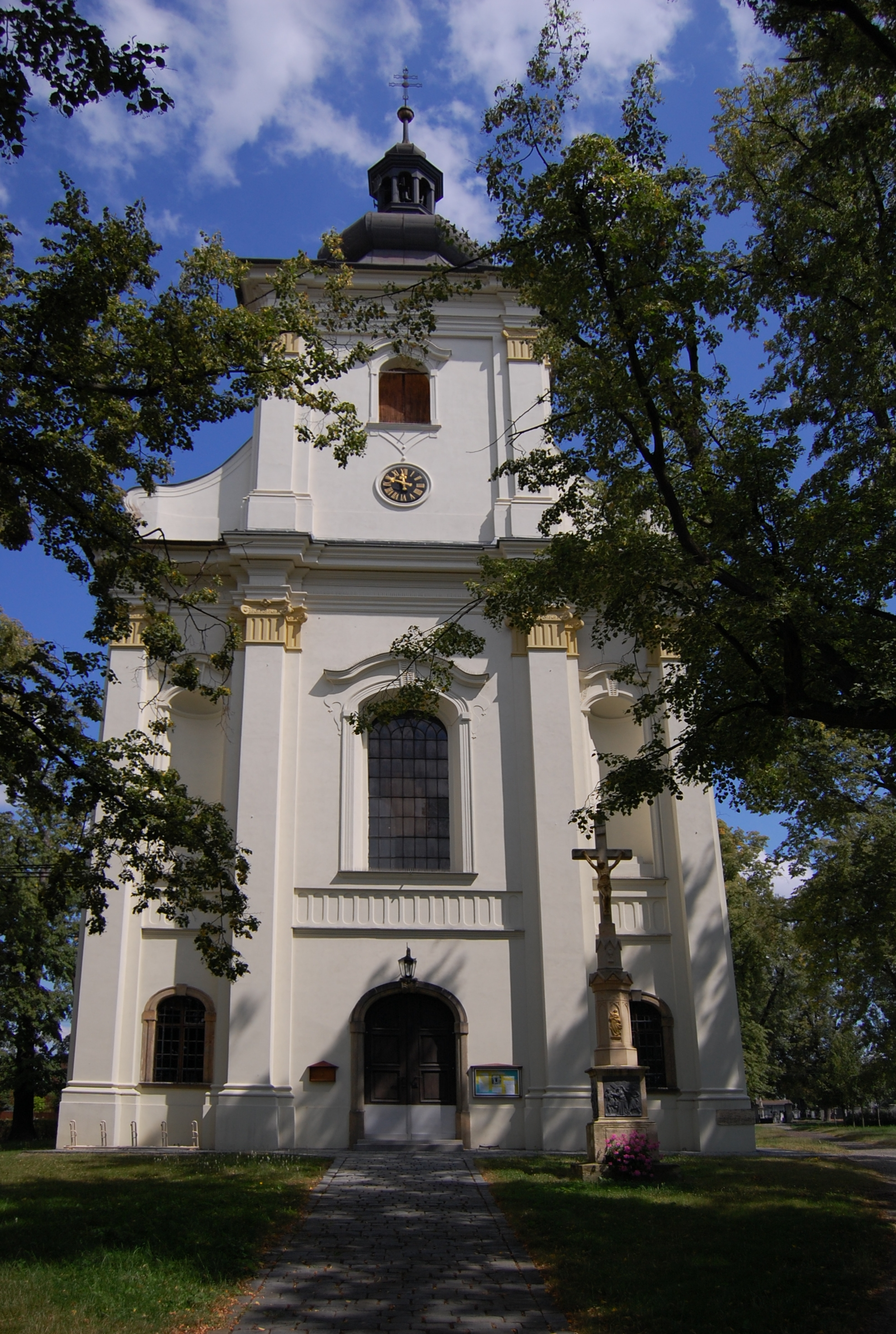 Kostel svatého Bartoloměje ve Vrahovicích, Prostějov